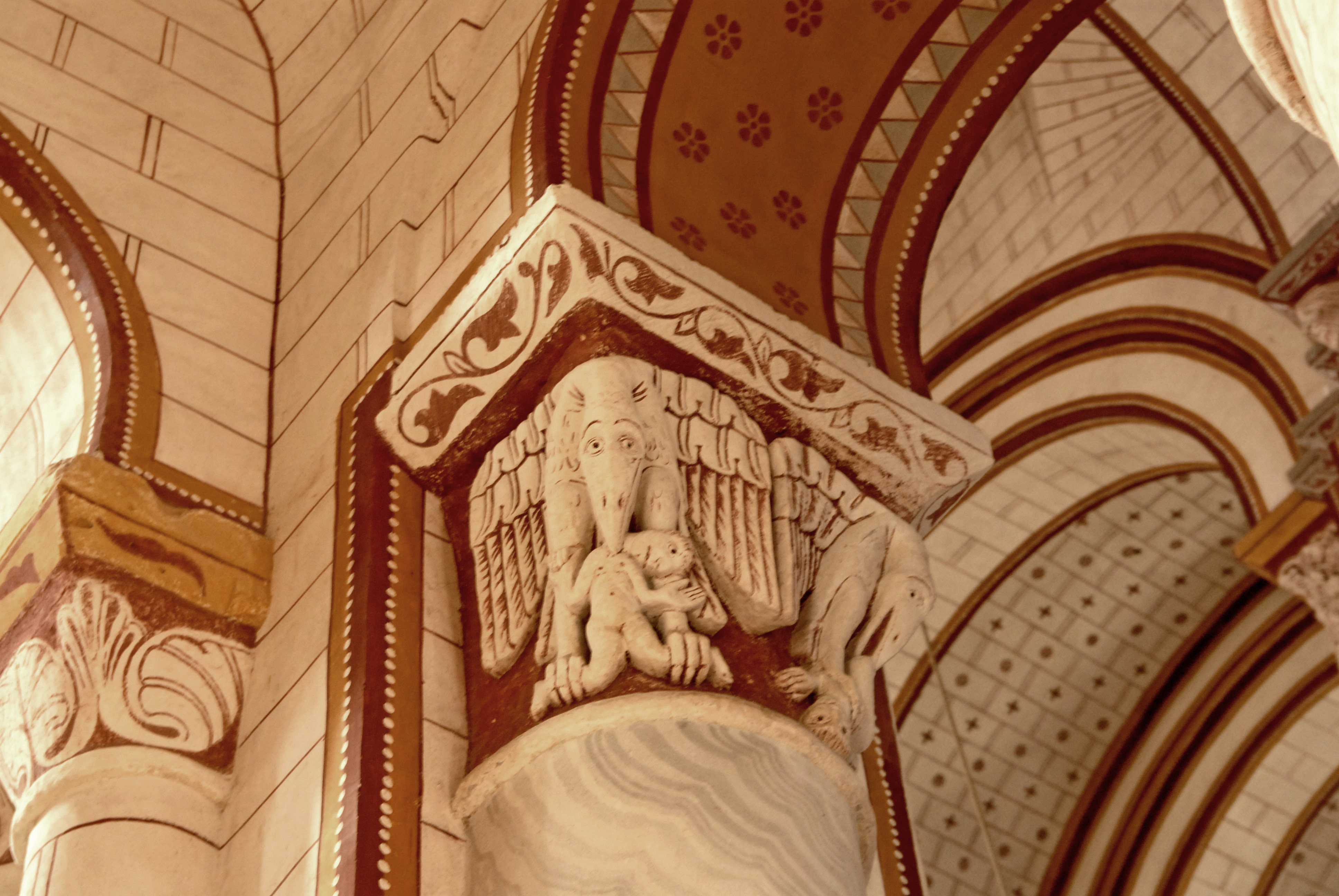 Kapitell I